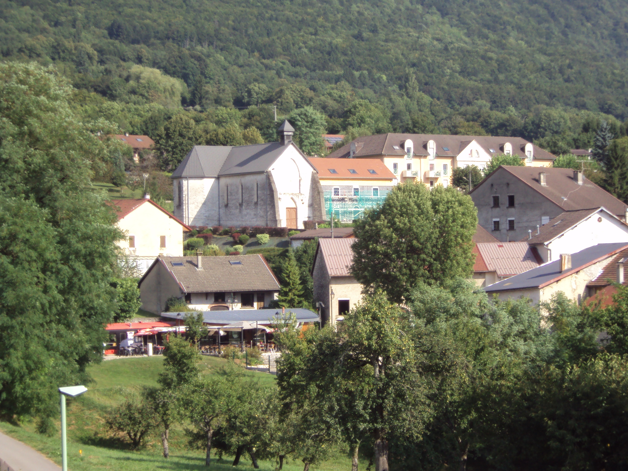 Le village de Confort, Ain, France.